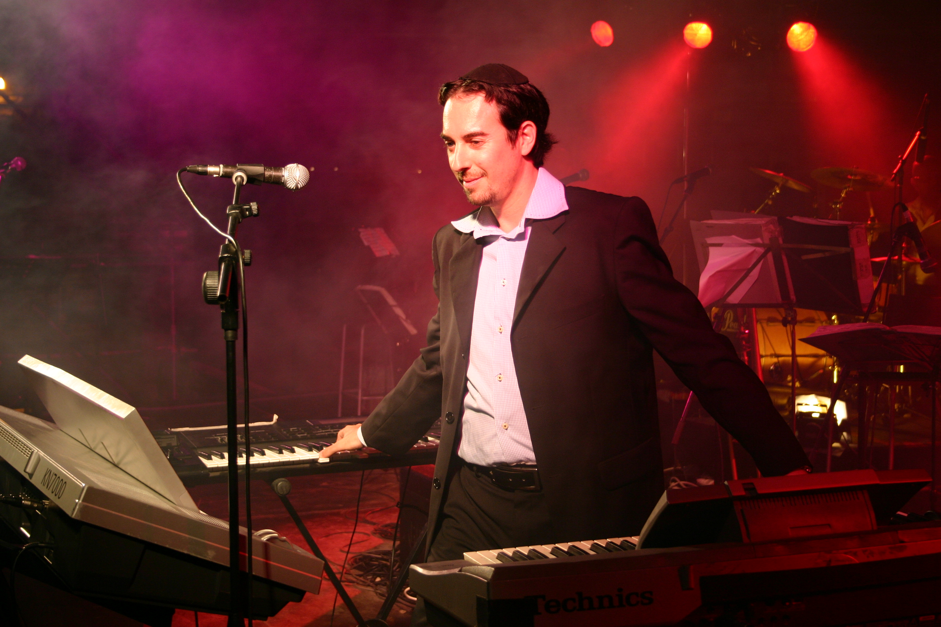 עמירן דביר בהופעה